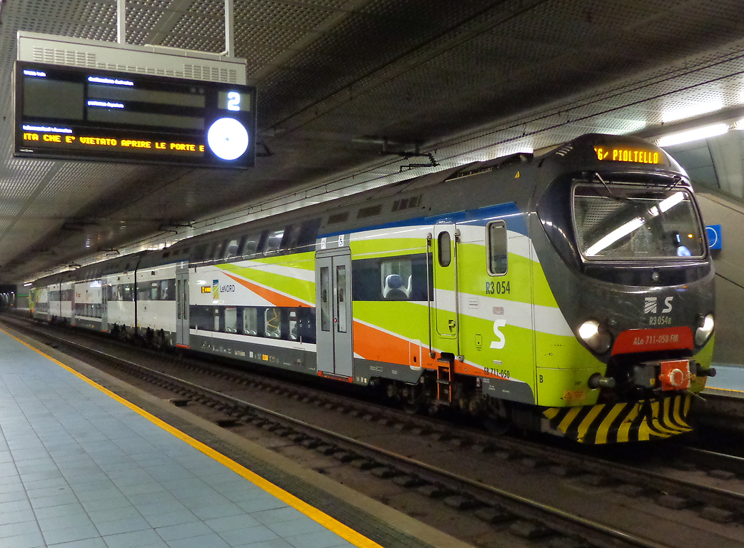 Stazione ferroviaria di Milano Porta Venezia. In sosta un elettrotreno tipo TSR in servizio sulla linea S6.